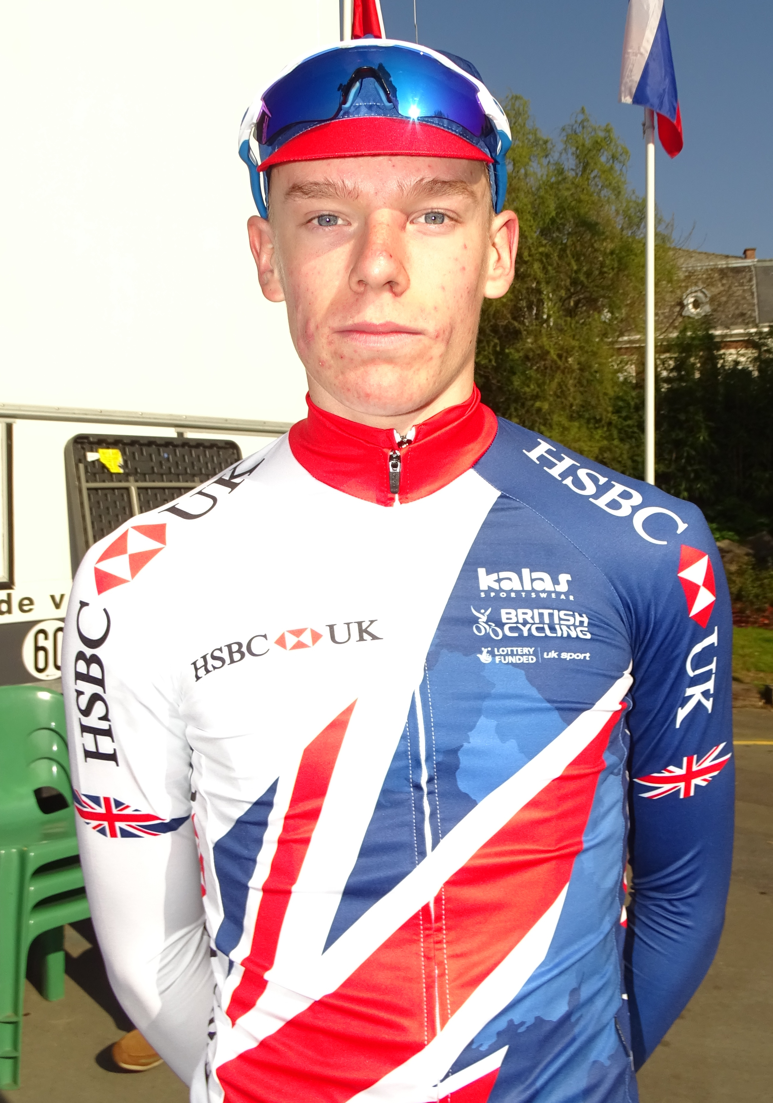 Reportage réalisé le dimanche 9 avril à l'occasion du départ du Paris-Roubaix juniors 2017 à Saint-Amand-les-Eaux, France.